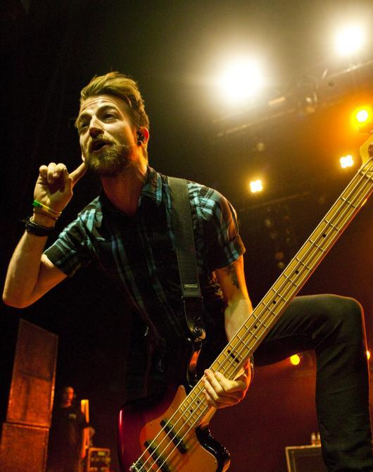 Paramore ao vivo no Credicard Hall - 20 de fevereiro de 2011 - São Paulo, SP, Brasil.